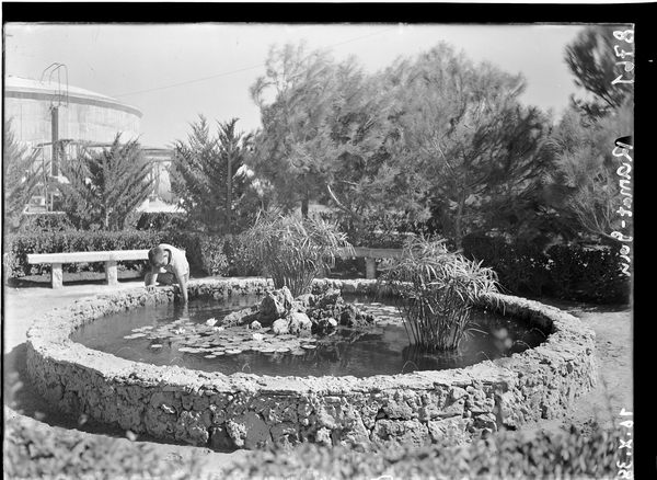 בריכת נוי בגן שאול, ברקע מגדל המים הישן.